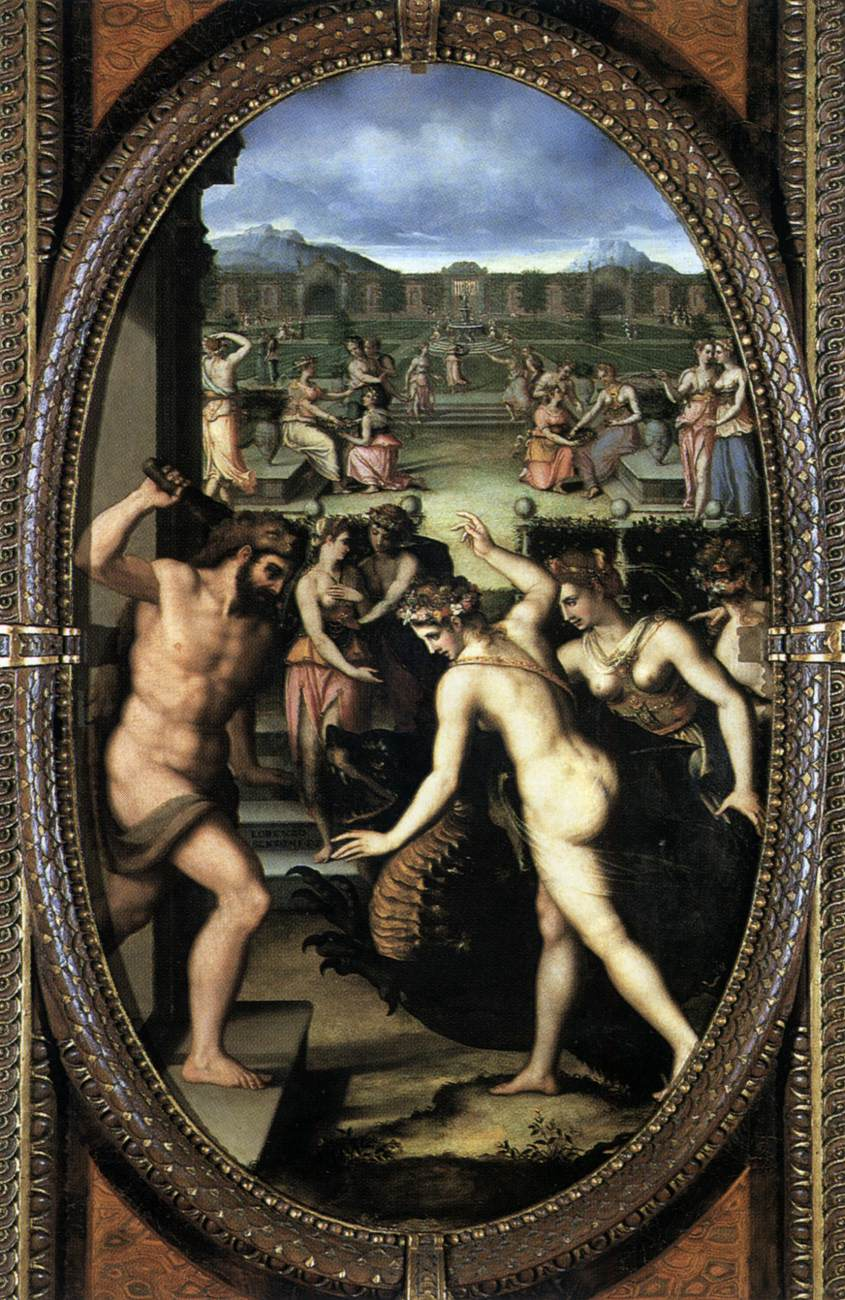 Lorenzo Vaiani, detto lo Sciorina Hercules Killing the Dragon in the Garden of the Hesperides 1568 Affresco Palazzo Vecchio, Firenze Nota: This scene is on a painted door pilaster of a cabinet in the studiolo of Francesco I de' Medici in the Palazzo Vecchio.